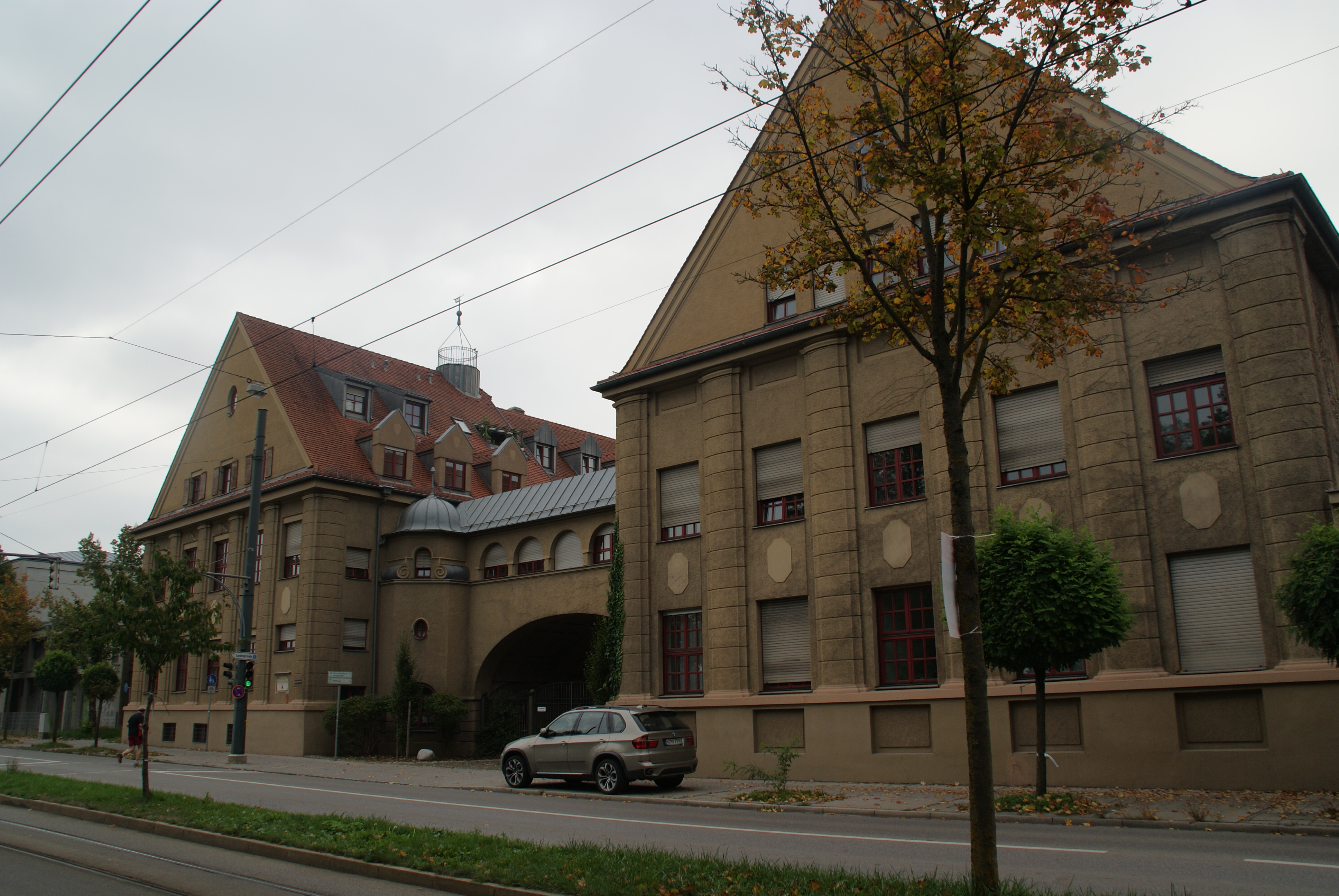 Ehem. Maschinenfabrik Keller & Knappich, Augsburg Kriegshaber